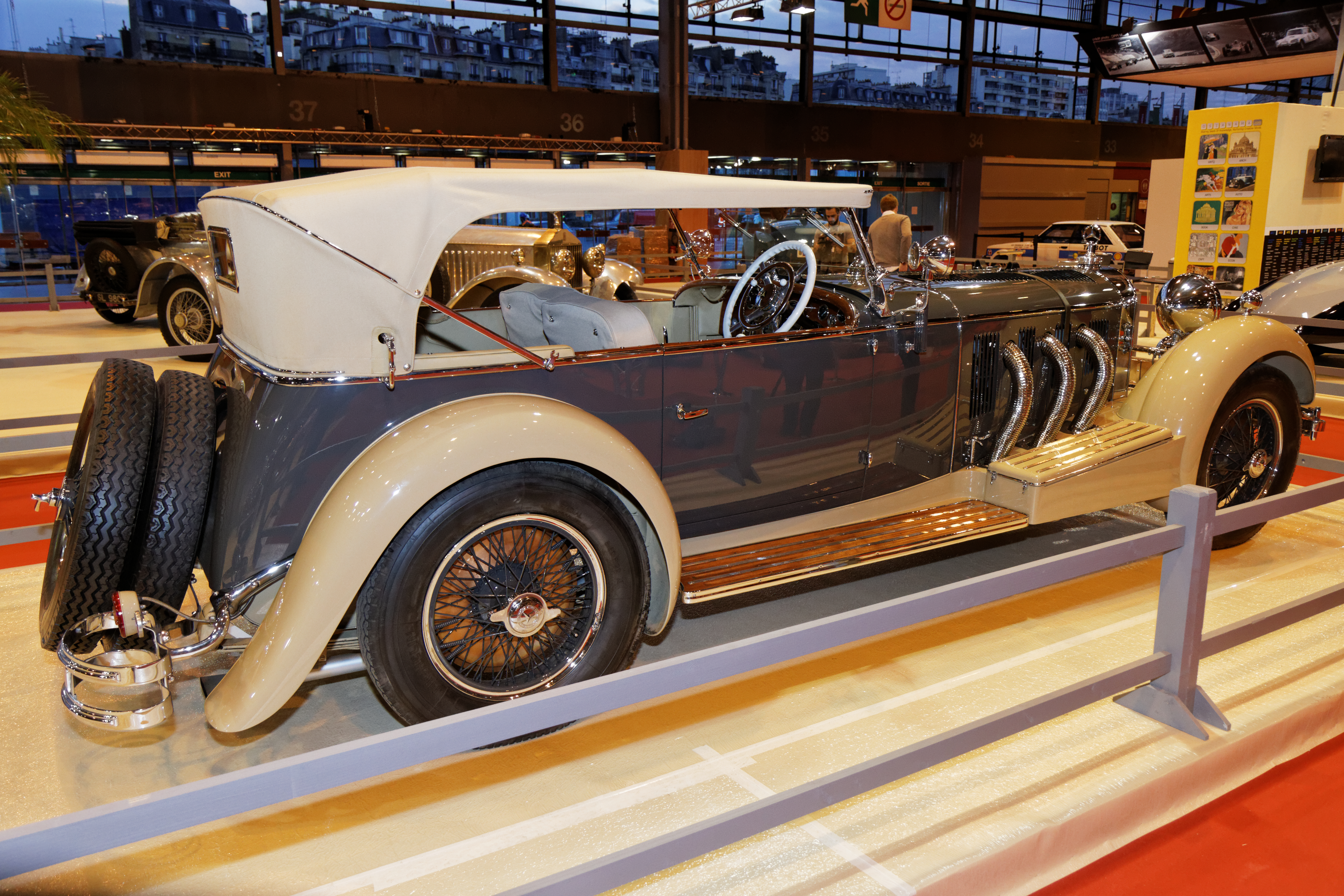 La Mercedes-Benz SS exposée lors du salon Retromobile 2014